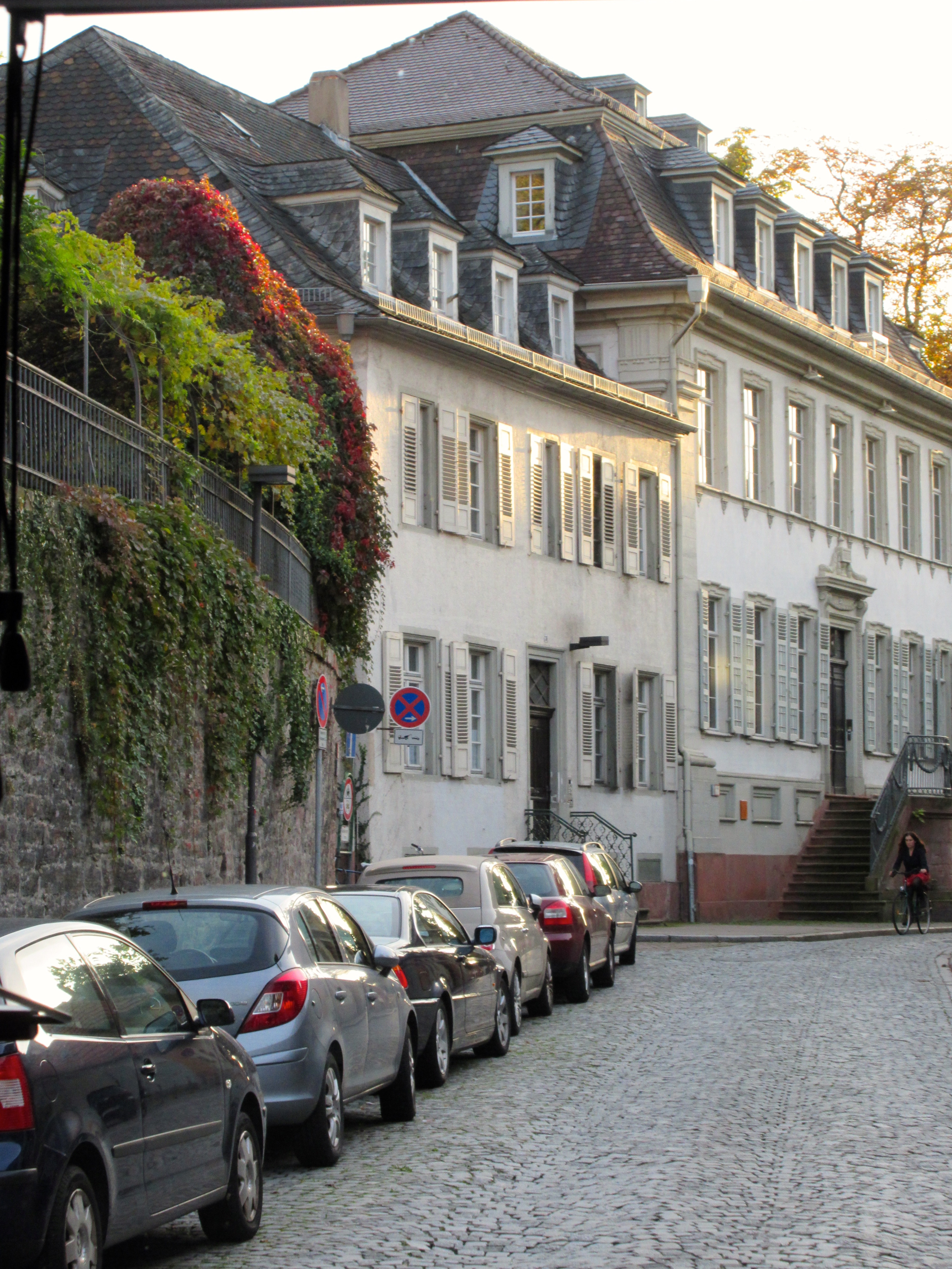 Haus Buhl Hauptstraße 234 Heidelberg